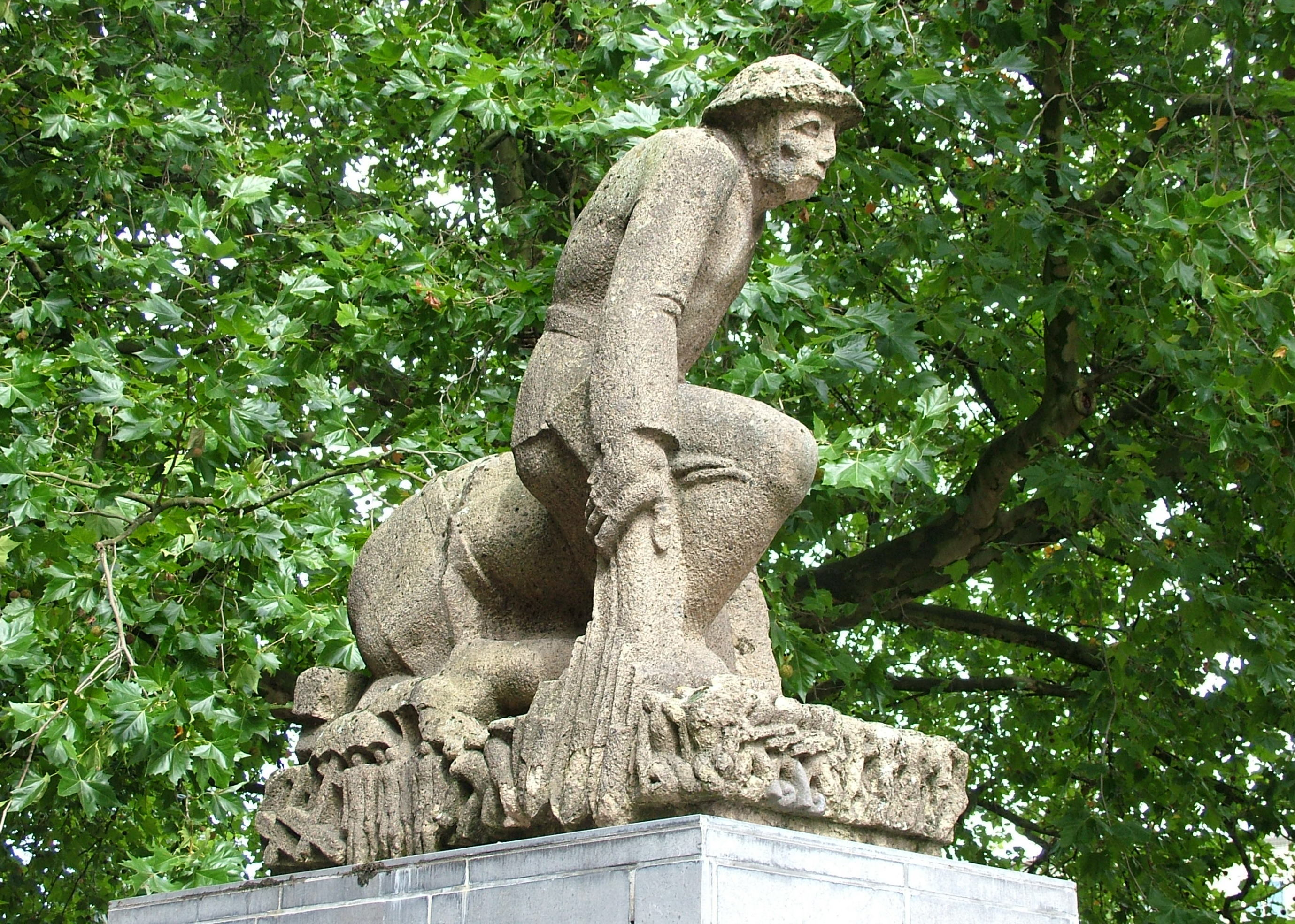 Nijmegen, monument bij het Plein 1944. Opschrift: "Jac Maris / Monument voor de Nederlandse militairen, / gevalen in de 2e Wereldoorlog / 1951 /